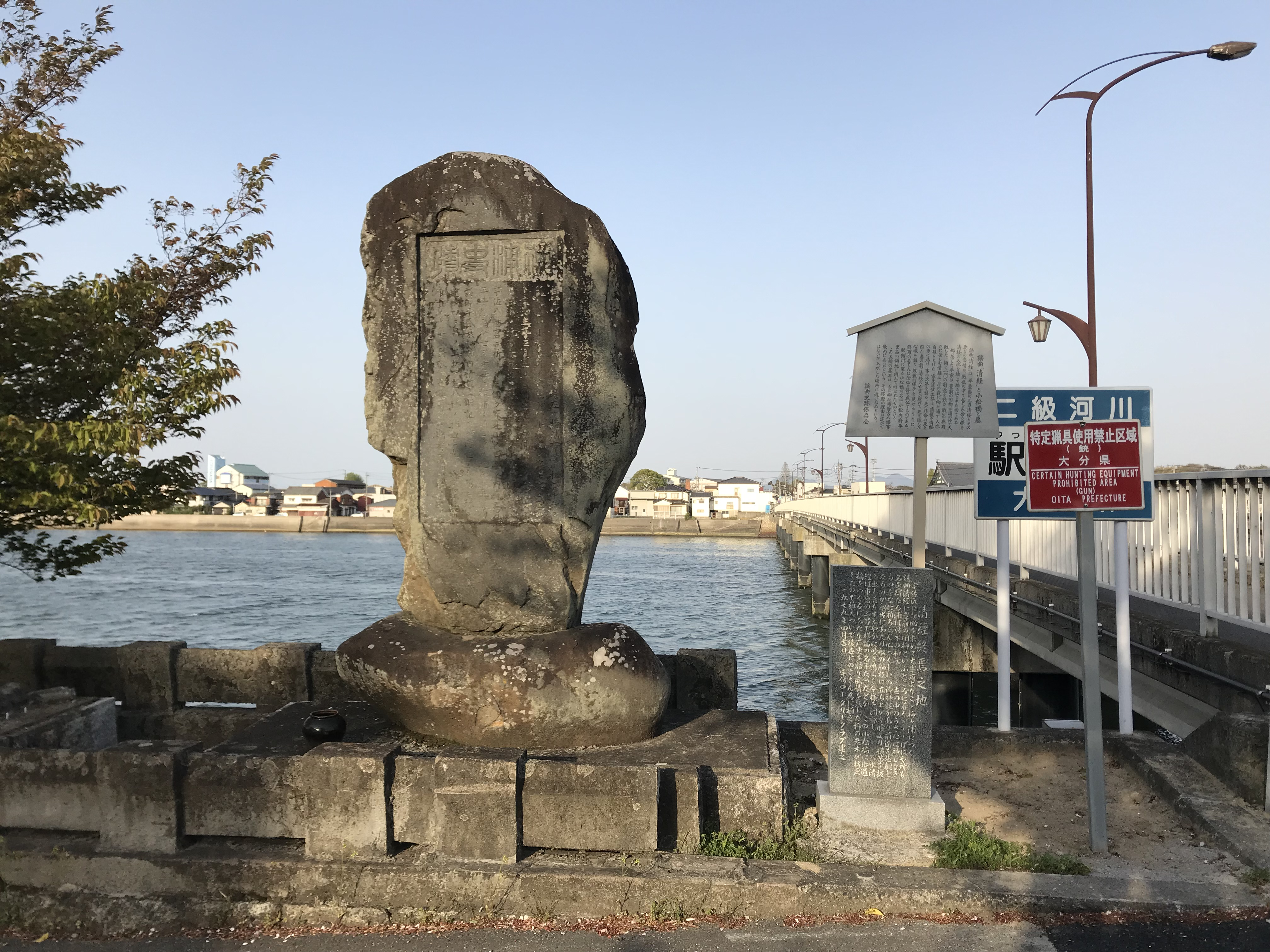 小松橋西詰にある平清経供養塔